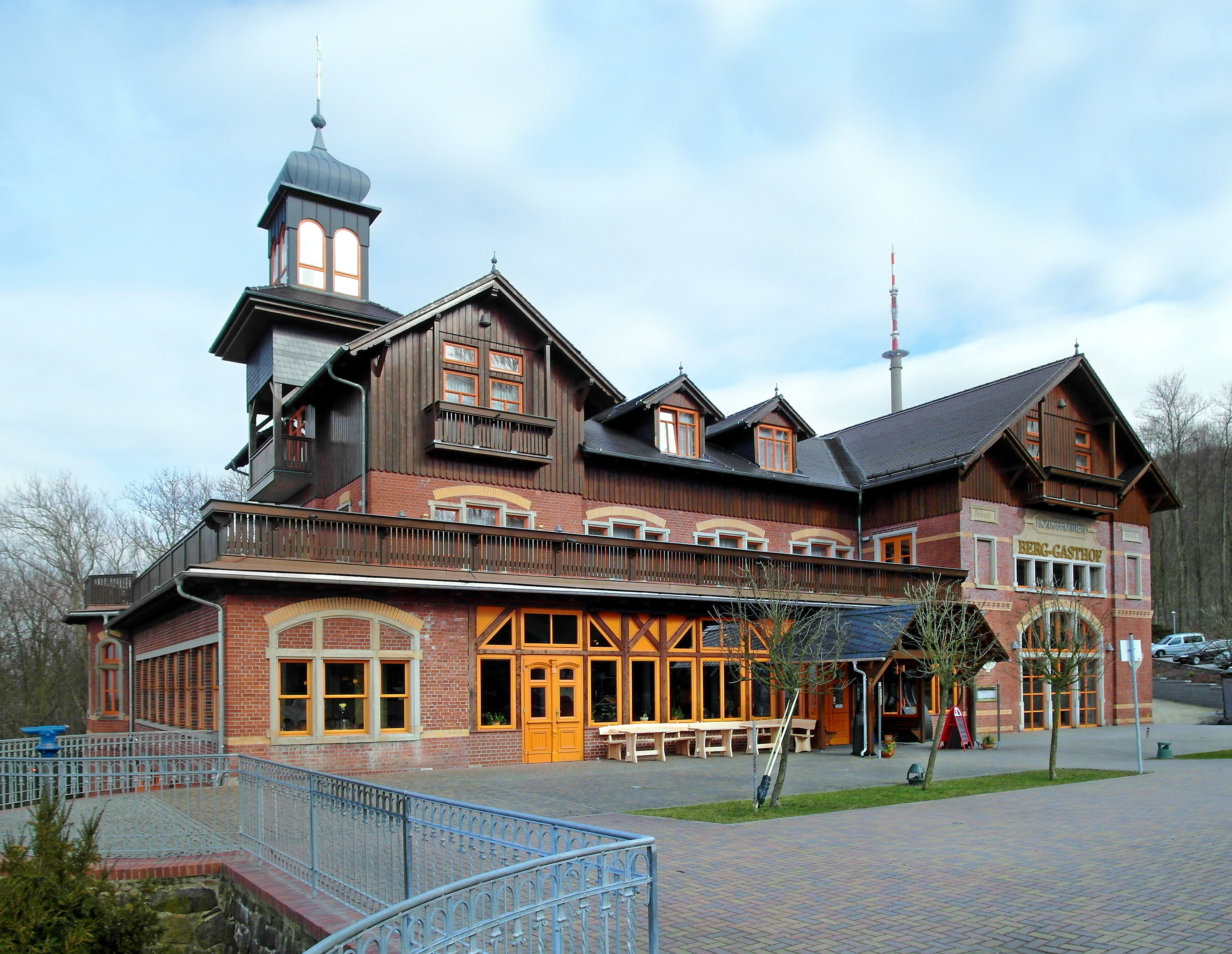 16.03.2017 02708 Löbau: Berg-Gasthof Honigbrunnen. Der heutige Bau, errichtet nach Entwürfen der Architekten Rudert und Müller, wurde 1896 erbaut. Nach wechselvoller Geschichte mit Schäden und Leerständen wurde der Berggasthof nach gründlicher Sanierung am 1. Dezember 2006 erneut eröffnet. [SAM8507.JPG]20170316410DR.JPG(c)Blobelt